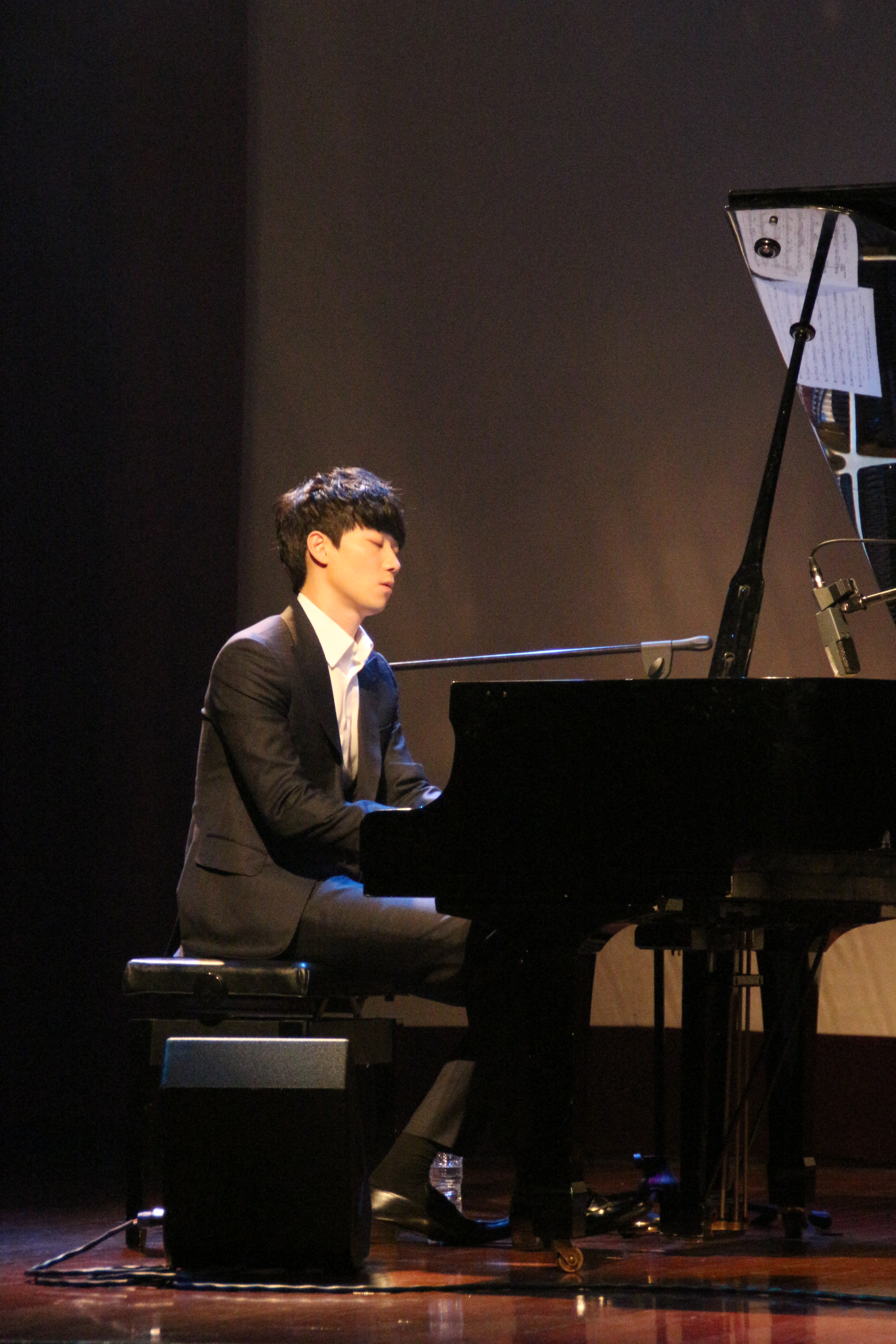 2015년 2월 8일 현대백화점 킨텍스점에서 열린 콘서트 ‘Cinema Music Box’에서 피아니스트 윤한이 피아노를 연주하고 있다.